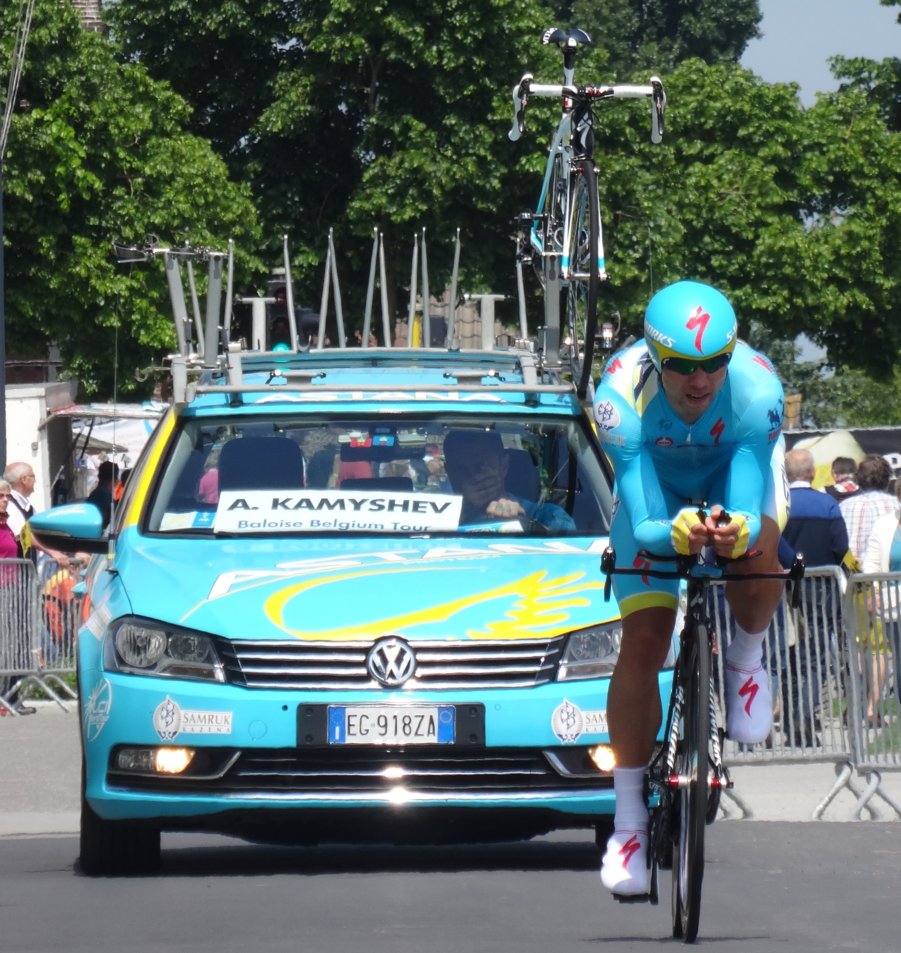 Reportage photographique réalisé le vendredi 30 mai à l'occasion du contre-la-montre individuel de la troisième étape du Tour de Belgique 2014 à Dixmude, Belgique.